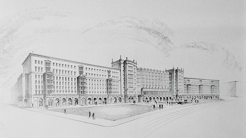 Original image description from the Deutsche Fotothek Gebäudefront des Promenadenrings mit den beiden neungeschossigen Turmhäusern